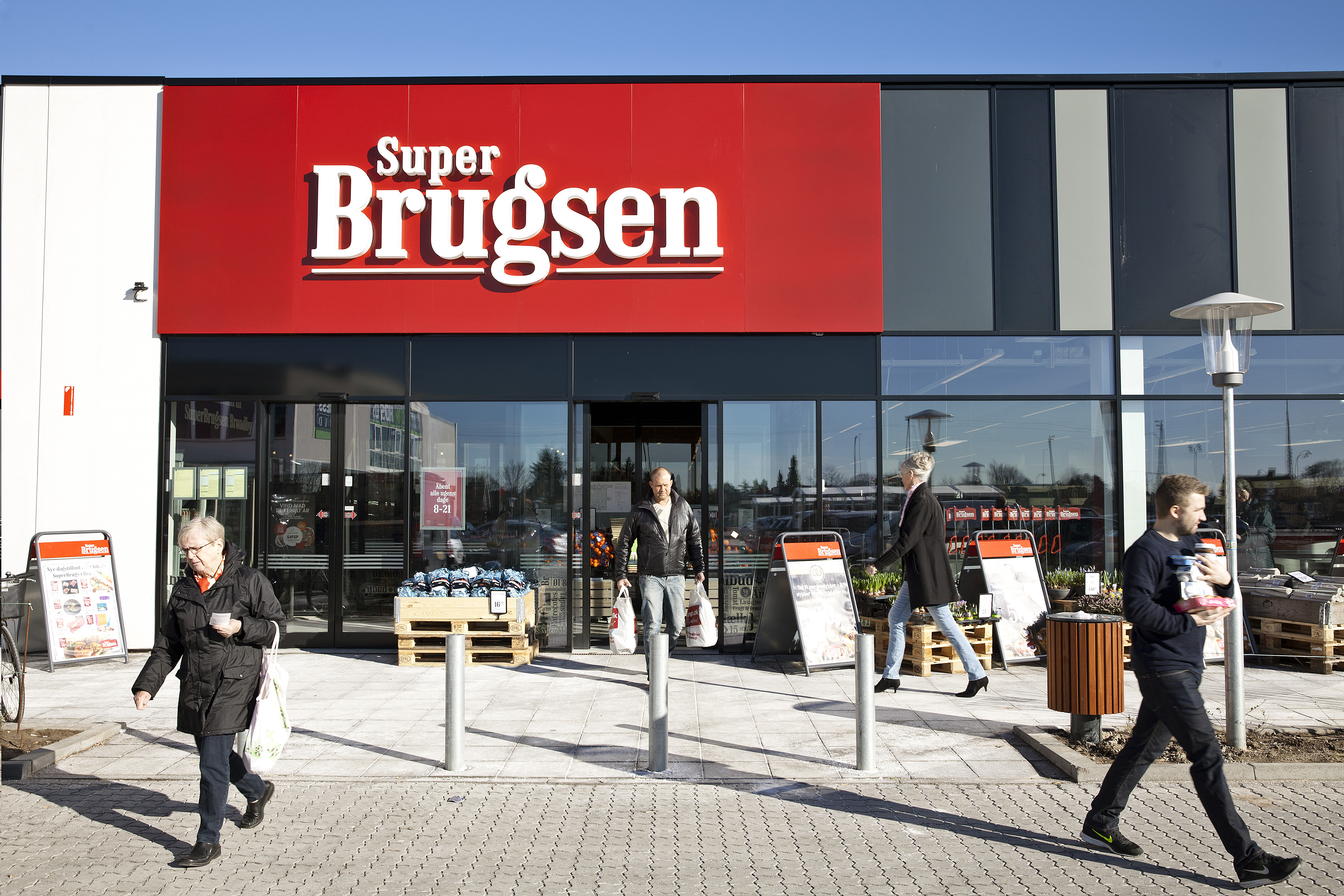 Butiksfacade i en SuperBrugsen butik, der drives af Coop Danmark.